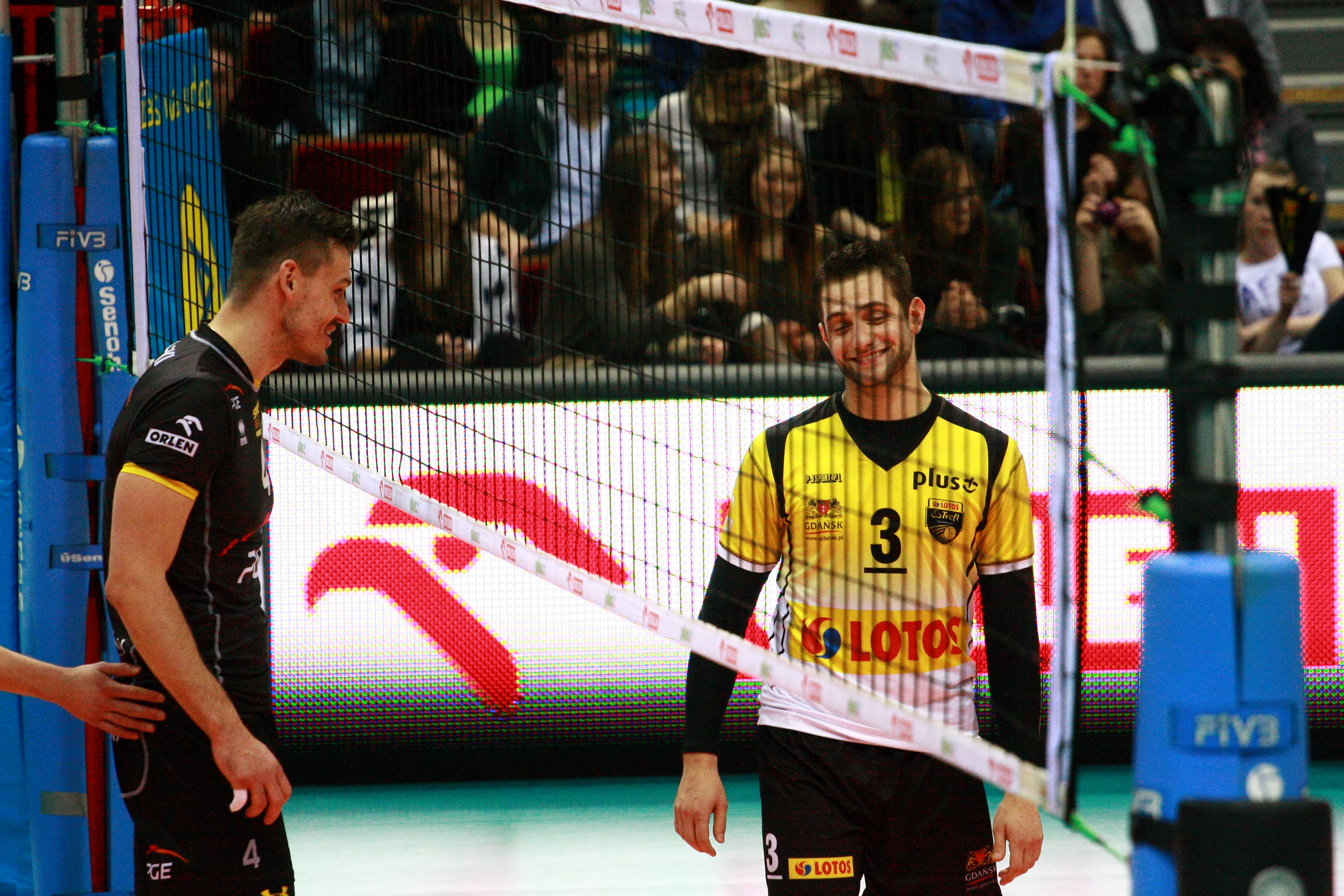 Lotos Trefl Gdańsk vs Skra Bełchatów, po prawej Grzegorz Łomacz (3).